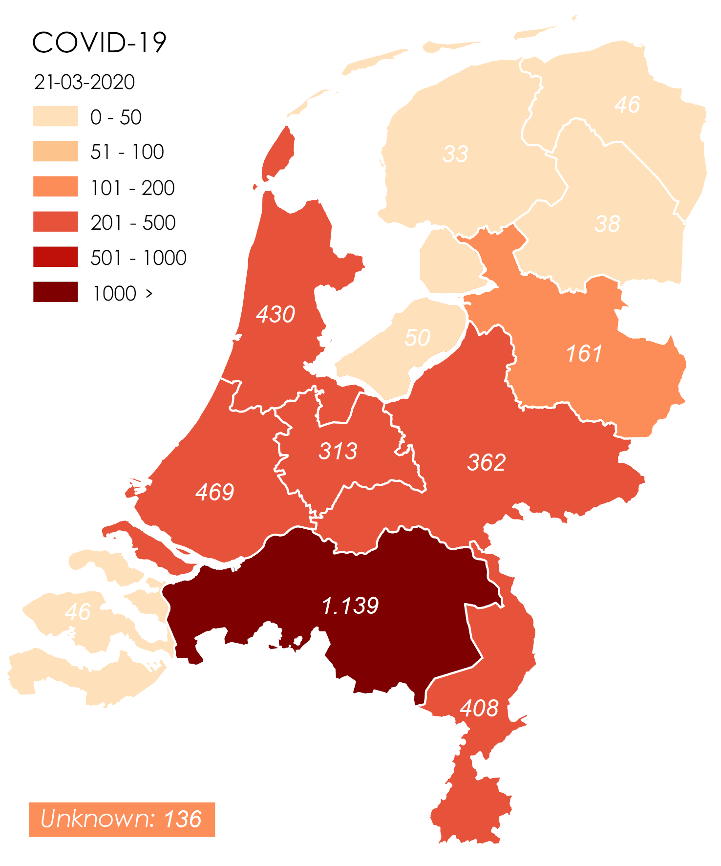 Geregistreerde Covid-19-besmettingen per provincie (Nederland) d.d. 21 maart 2020.